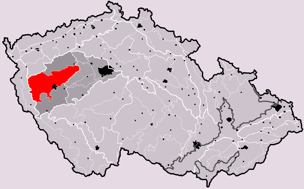 Poloha geomorfologického celku Plaská pahorkatina v rámci České republiky. Hercynský systém Hercynská pohoří I Česká vysočina I5 (V) Poberounská subprovincie I5B (VB) Plzeňská pahorkatina I5B-2 (VB-2) Plaská pahorkatina